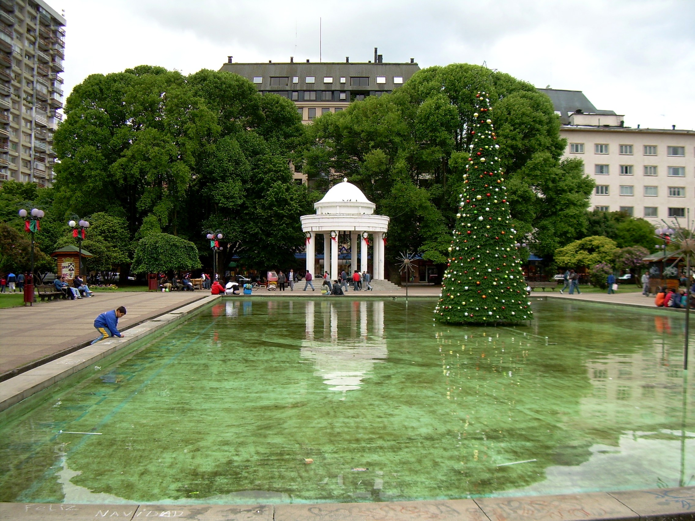 Plaza de armas otra vez.jpg